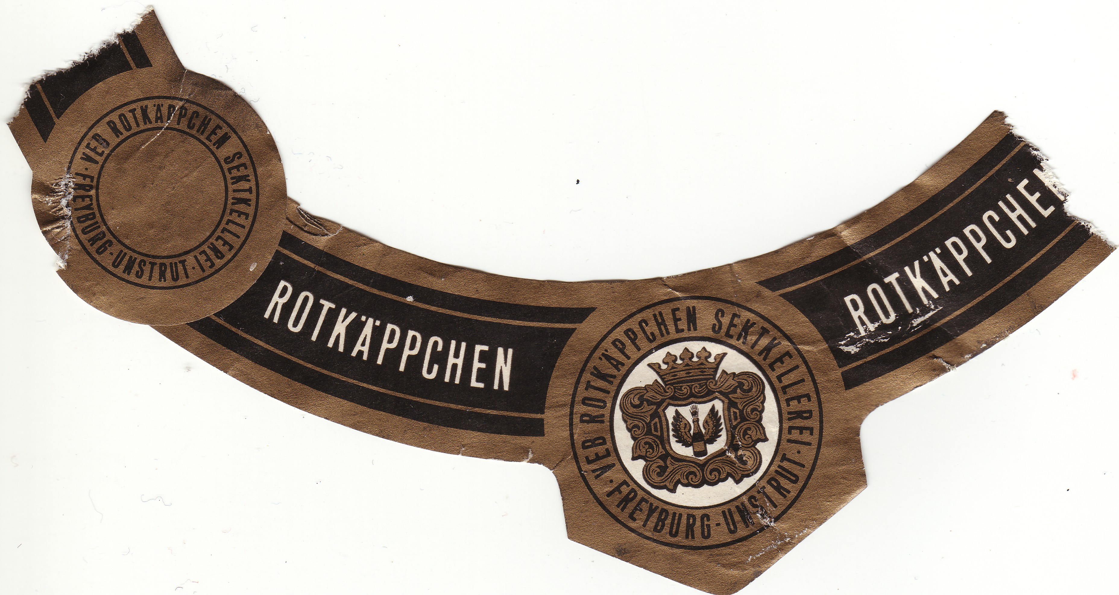 Rotkäppchen Sektkellerei: Etikett aus der Zeit um 1979. VEB Rotkäppchen Sektkellerei. Betrieb der ausgezeichneten Qualitätsarbeit. Deutscher Sekt – Made in DDR.